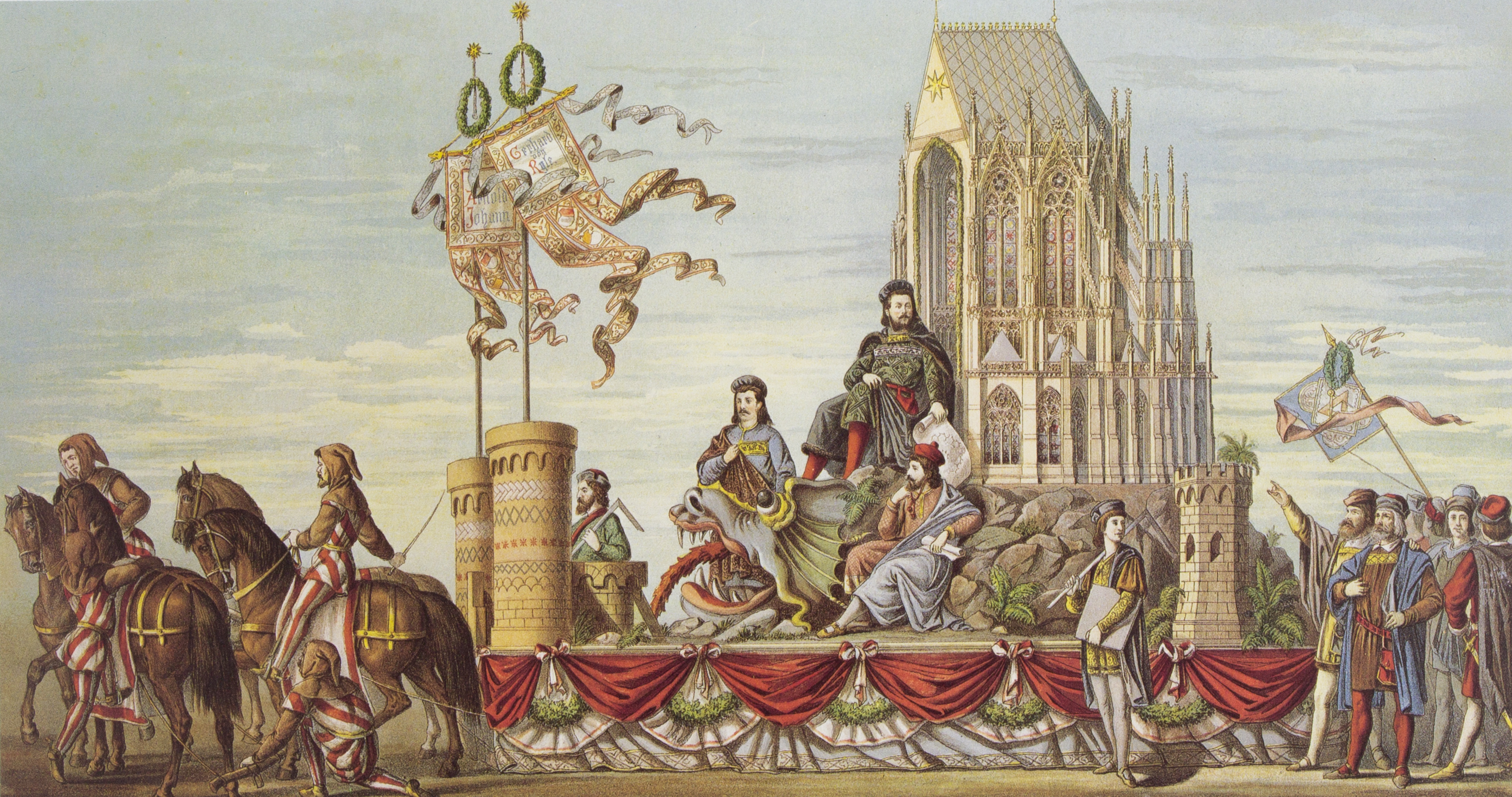 Tony Avenarius: Historischer Festzug veranstaltet bei der Feier der Vollendung des Kölner Doms am 18. October 1880. Tafel XXI